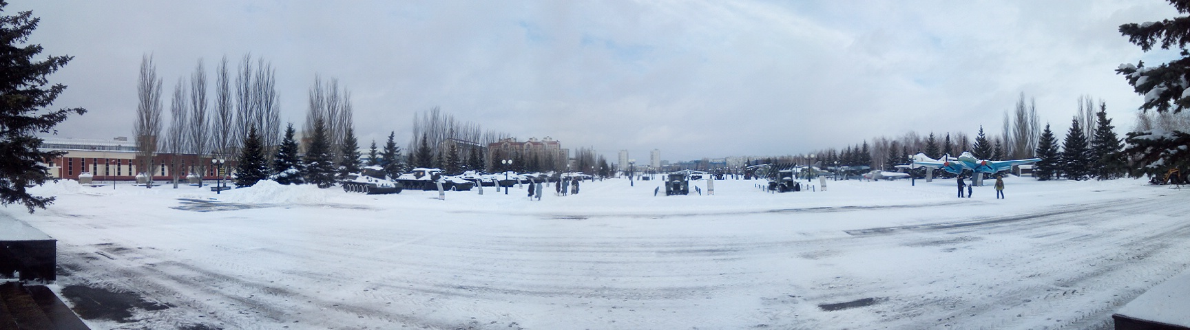 Парк Победы (Казань) - панорама